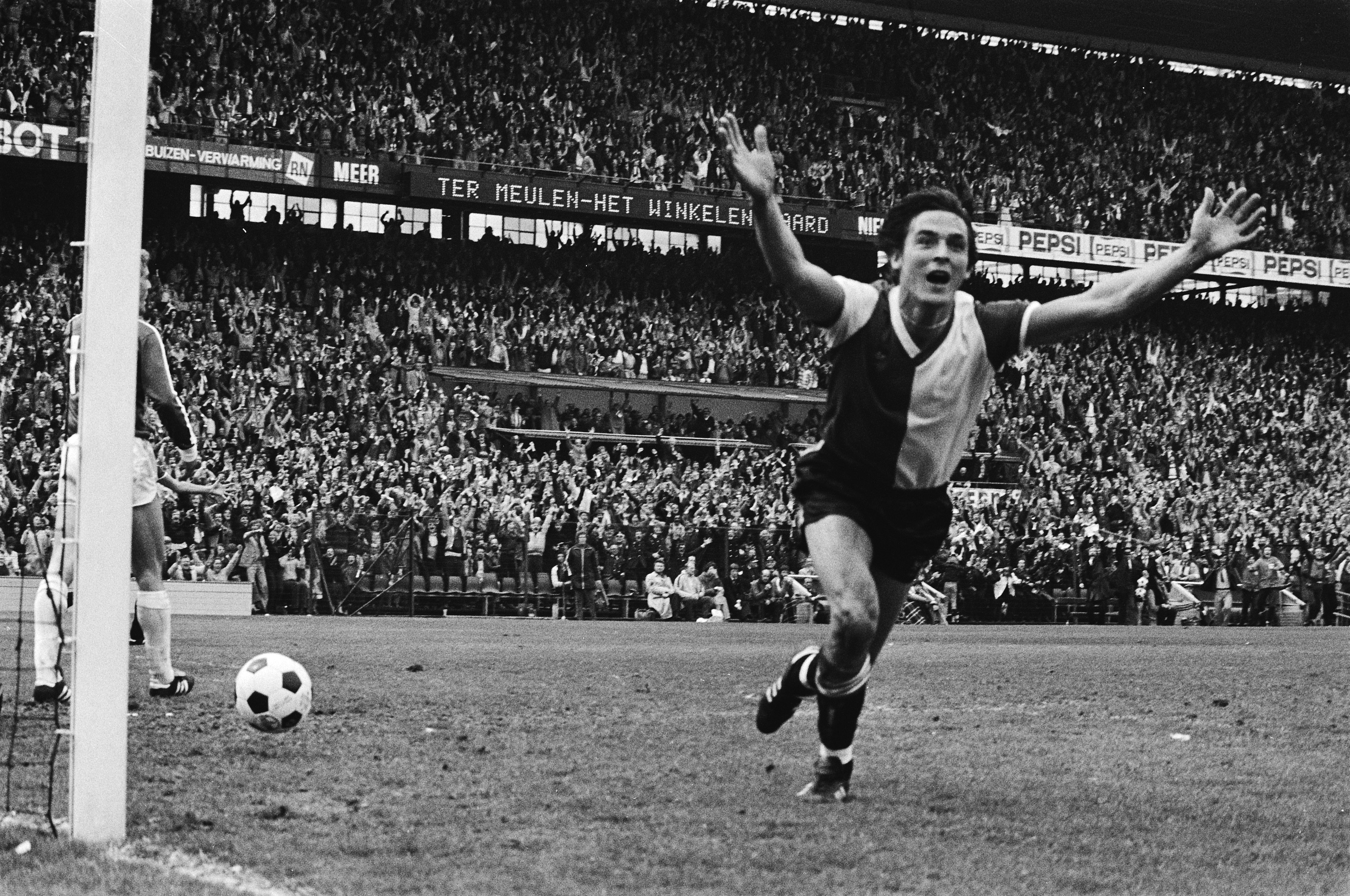 Collectie / Archief : Fotocollectie Anefo Reportage / Serie : Feyenoord tegen Ajax 1-1 Beschrijving : Juichende Jan Peters Datum : 29 april 1979 Locatie : Rotterdam, Zuid-Holland Trefwoorden : sport, voetbal Persoonsnaam : Peters, Jan Instellingsnaam : Feyenoord Fotograaf : Suyk, Koen / Anefo Auteursrechthebbende : Nationaal Archief Materiaalsoort : Negatief (zwart/wit) Nummer archiefinventaris : bekijk toegang 2.24.01.05 Bestanddeelnummer : 930-2402